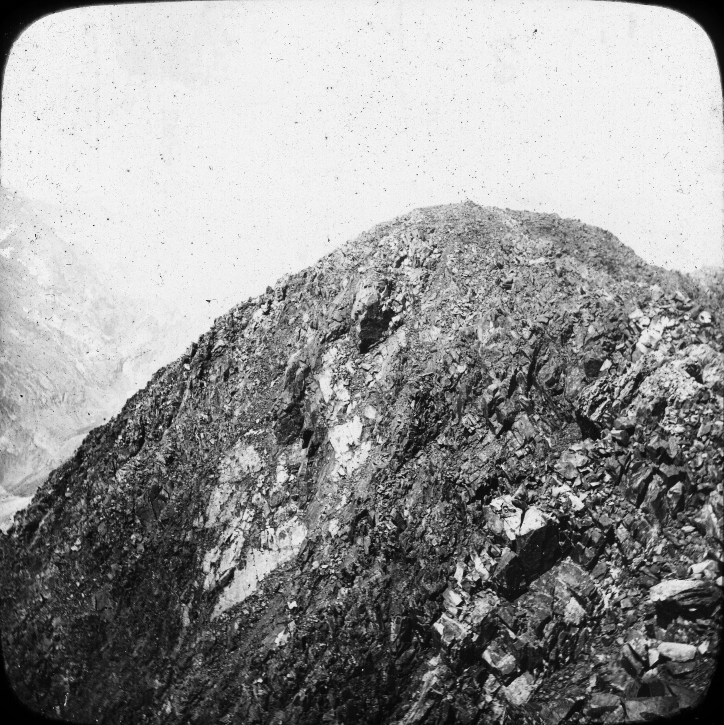 Fonds Trutat - Photographie ancienne Cote : TRU C 306 Localisation : Fonds ancien Original non communicable Titre : Sommet du Posets, vue prise de l'arête du Posets, Luchon Auteur : Trutat, Eugène Rôle de l’auteur : Photographe Lieu de création : Bagnères-de-Luchon (Haute-Garonne) Date de création : : 1859-1910 [entre] Mesures : 8 x 10 cm Observations : Cette plaque ne serait pas de Trutat mais ferait partie de sa collection de plaques de projection destinées à ses cours Mot(s)-clé(s) : -- Montagne -- Sommet (montagne) -- Crête (montagne) -- Versant rocheux -- Rocher -- Pierre -- Posets (Espagne ; massif) -- Pyrénées (Espagne) -- Bagnères-de-Luchon (Haute-Garonne) -- Bagnères-de-Luchon (Haute-Garonne ; canton) -- Midi-Pyrénées (France) -- 19e siècle, 2e moitié -- 20e siècle, 1e quart Médium : Photographies -- Positifs sur plaque de verre -- Noir et blanc -- Paysages de montagne Bibliographie : Frappé (Jean-Bernard). - Autrefois Bagnères de Luchon. Tome I. - Anglet : Atlantica, 2001. - 345 p. ; 15 x 22 cm. - (Autrefois) cf. p. 140-141. Bibliothèque de Toulouse. Domaine public